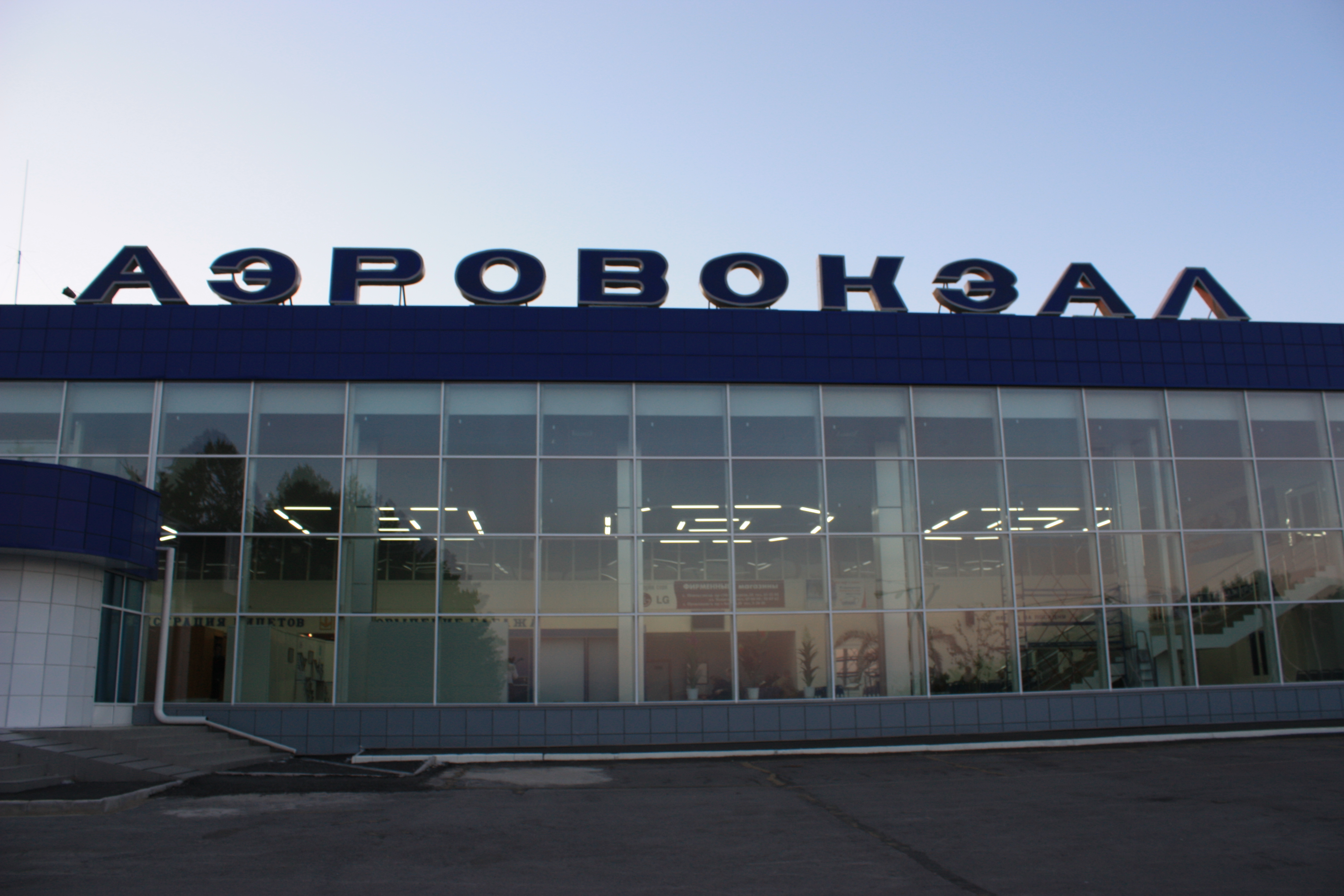 Prokopyevsky District, Kemerovo Oblast, Russia